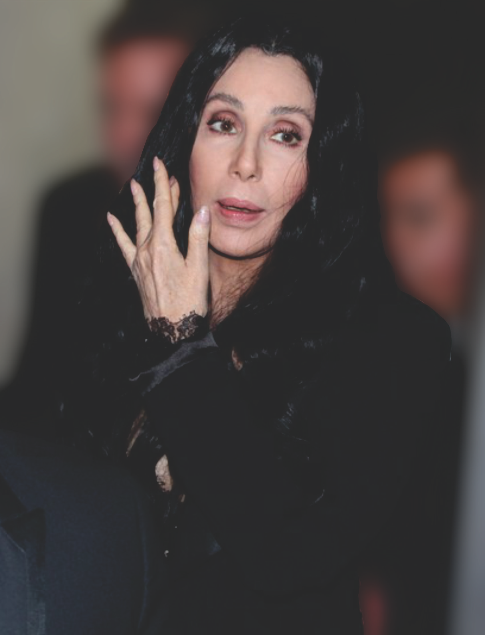 La Cantante Cher en 2015